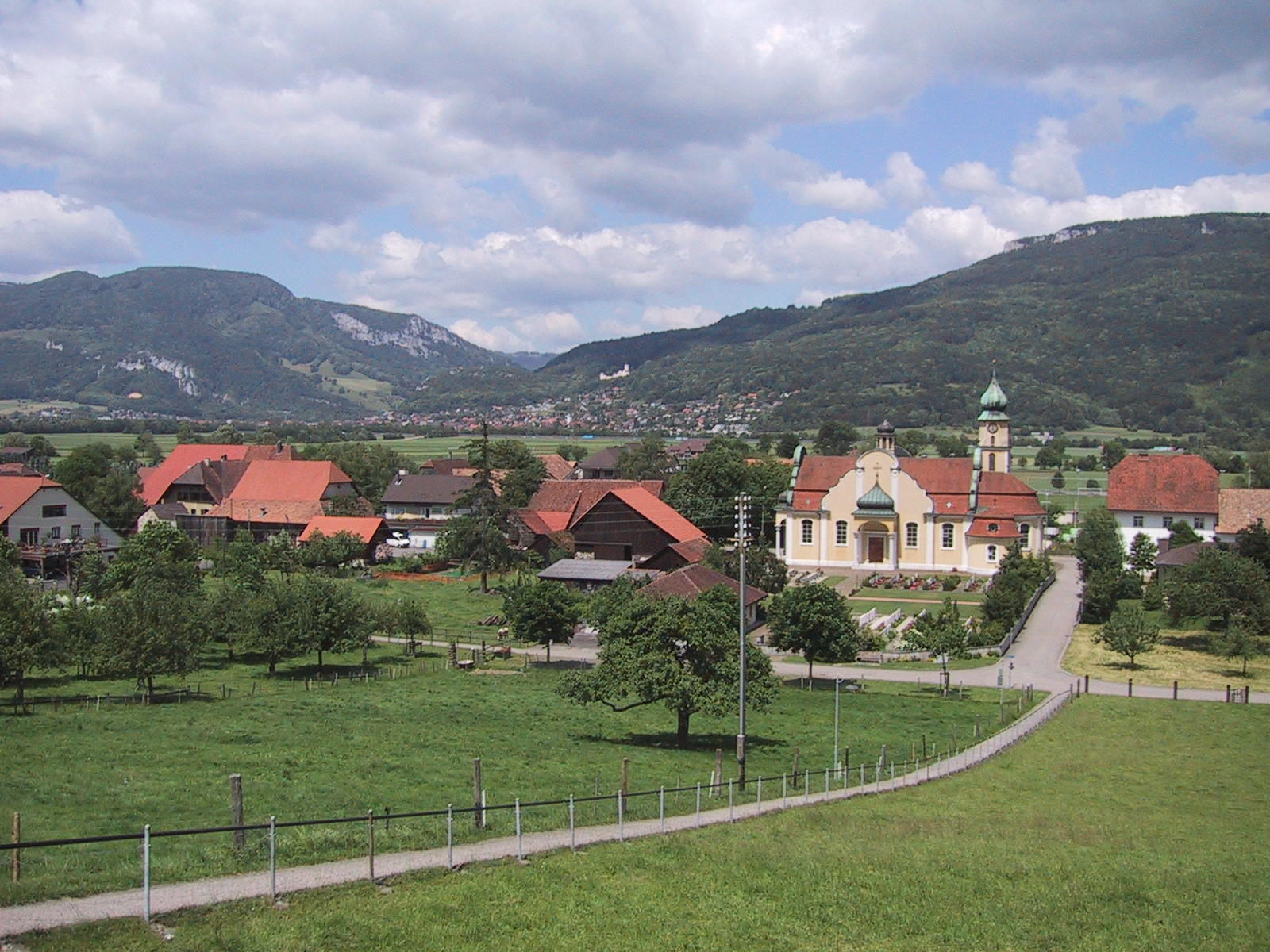 Aufnahme 8. Juni 2005, Kestenholz im Solothurner Bezirk Gäu. Fotograf Peter Berger (selbst fotografiert). Lizenzstatus "GNU-FDL"